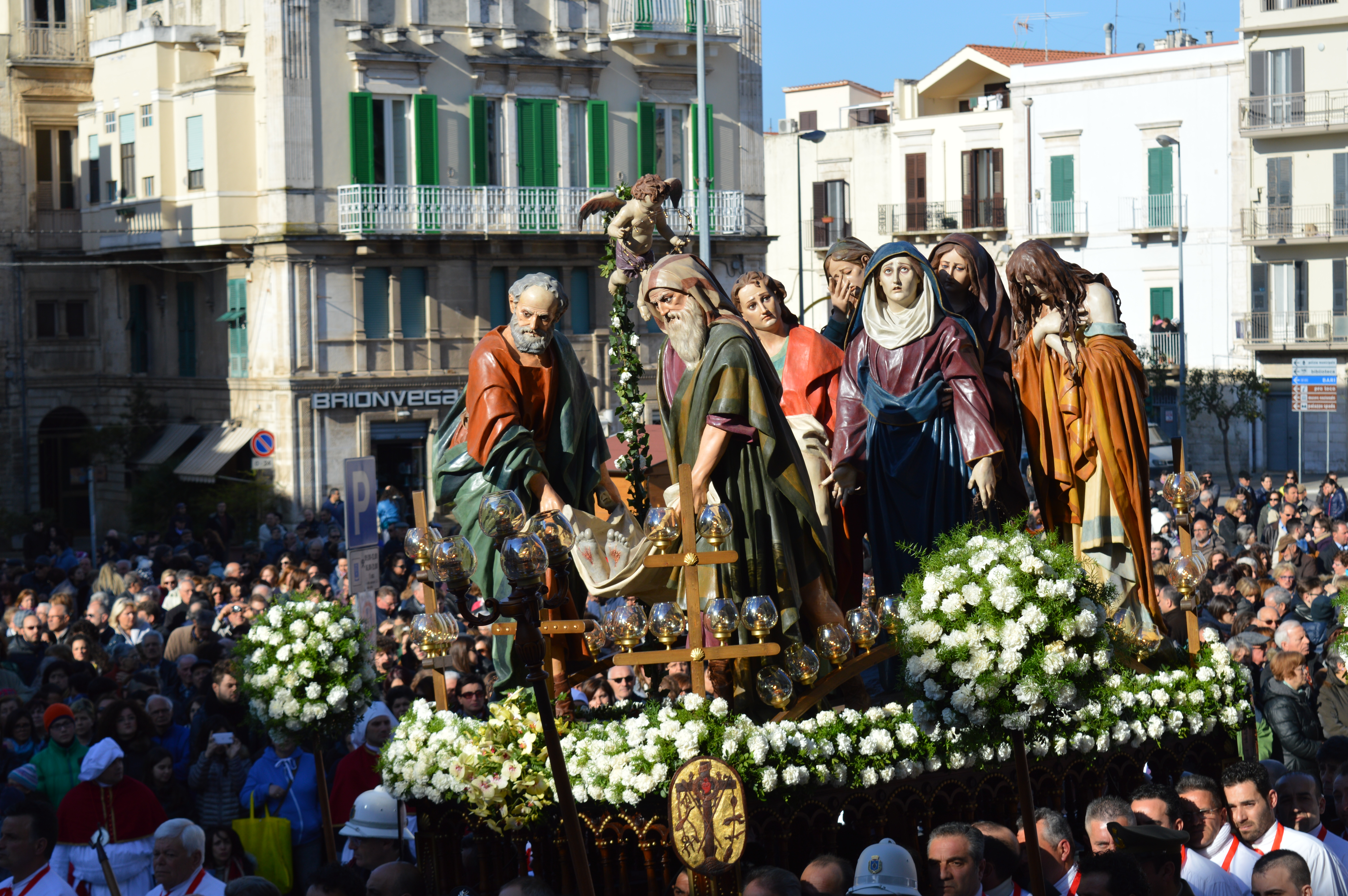 Ottosanti